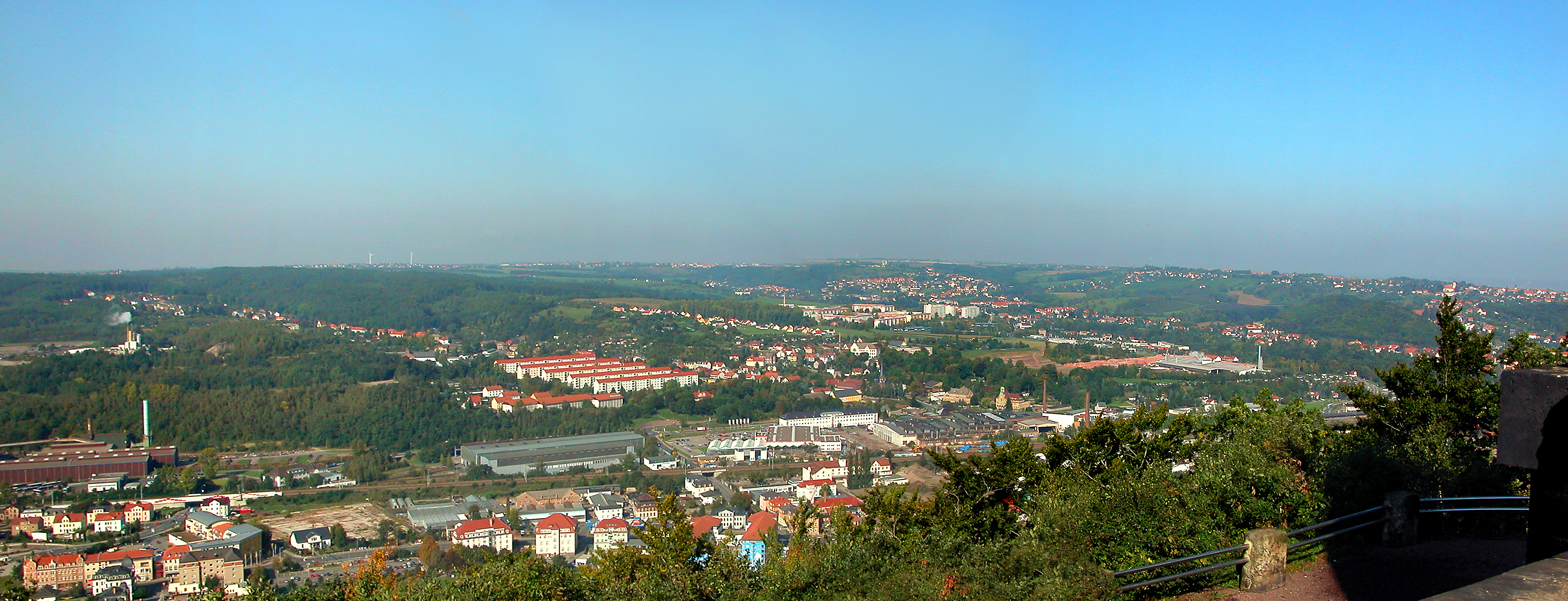 26.09.2008 01705 Freital: Sicht vom Windberg (GMP: 50.997728,13.659658): Der linke Vordergrund ist Freital-Deuben. Am Horizont Oberhermsdorf, Kesselsdorf, Freital Wurgwitz. Links angeschnitten die Werksanlagen des Edelstahlwerkes Freital (GMP: GMP 50.9970,13.6418). In Bildmitte das auffällige Altneubau-Wohngebiet mit der strengen Zeilenbebauung und den roten Dächern ist in Freital-Döhlen. Rechts davon, weiter im Vordergrund, die "Windberg-Arena" (GMP: 51.005465,13.650230), eine umgenutzte DDR-Industriehalle des einstigen Plastmaschinenwerkes (2015 abgerissen). Gleich rechts dahinter das ehemalige Rathaus Döhlen (GMP: 51.007008,13.650152) mit der grünen Kupferkuppel an der Lutherstraße 22. 200 m links davon die Lutherkirche (GMP: 51.006797,13.647779). Hinter ihrer Turmspitze die Deubener Schule aus der Gründerzeit, hinter dieser wiederum das DDR-Neubaugebiet (GMP: 51.015051,13.636240) Freital-Zauckerode. Dahinter zieht sich Freital-Wurgwitz den Hang zum Horizont hinauf. Rechts am Horizont liegt Freital-Pesterwitz mit der St. Jakobuskirche (GMP: 51.027632,13.651156). Etwas links davor erkennt man den Burwartsberg, auf dem sich einst das Castell Thorun (GMP: 51.01733,13.652251) befand. [DSCN34171-34172.TIF]20080926065MDR.JPG(c)Blobelt